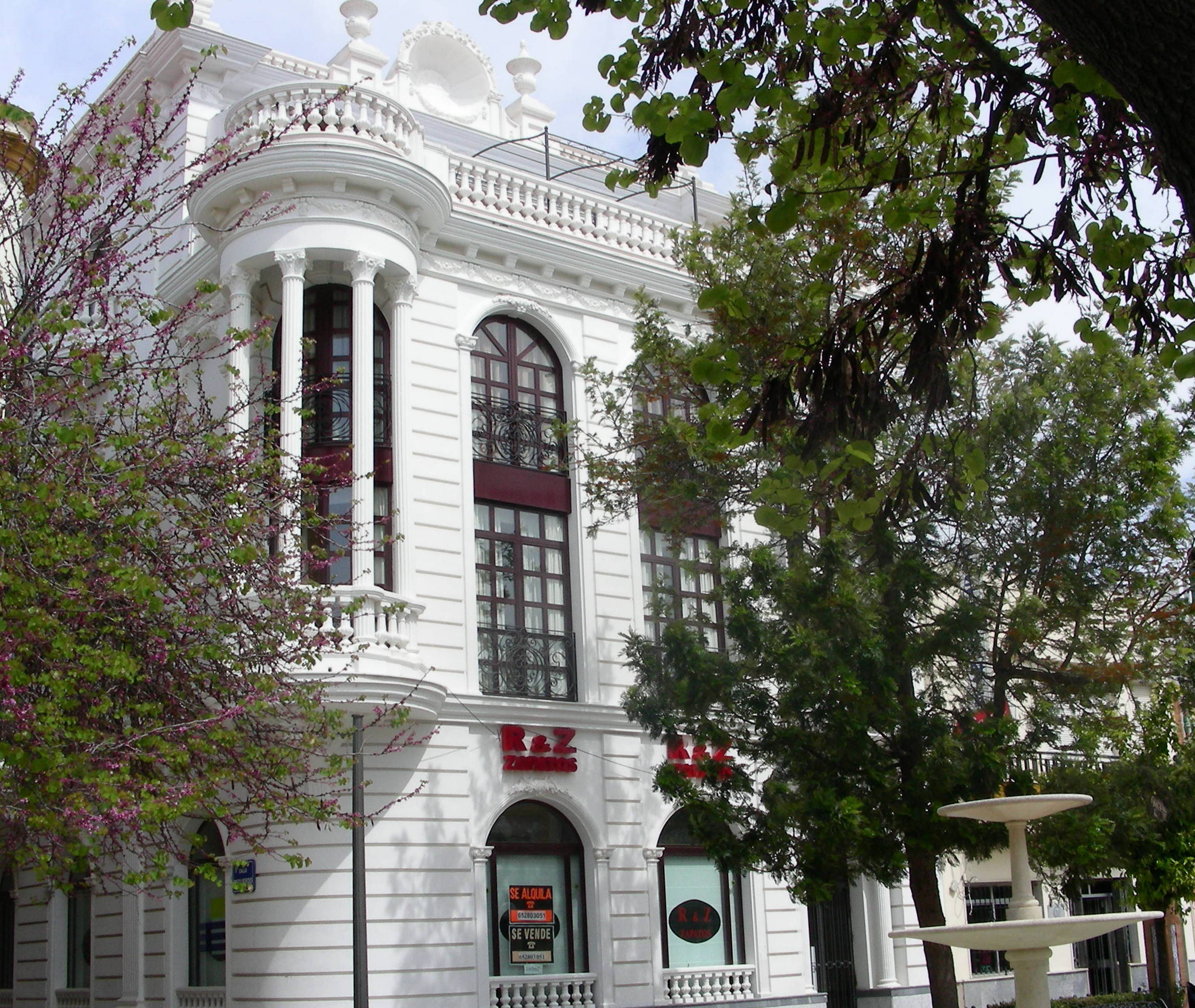 Edificio modernista en Isla Cristina, "casa de Gildita"